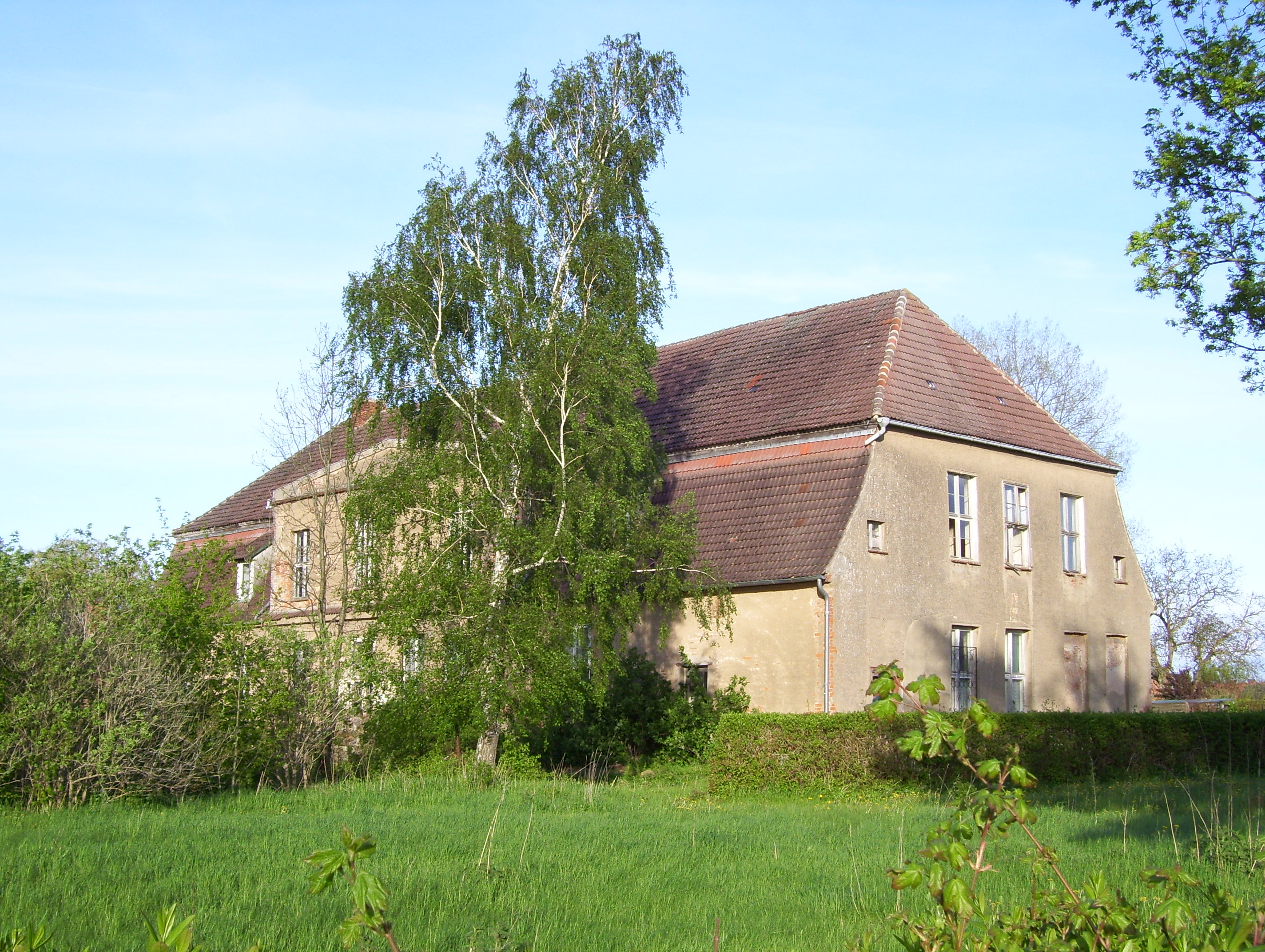 Herrenhaus in Ganschendorf, Gemeinde Sarow, Parkseite (Westseite)